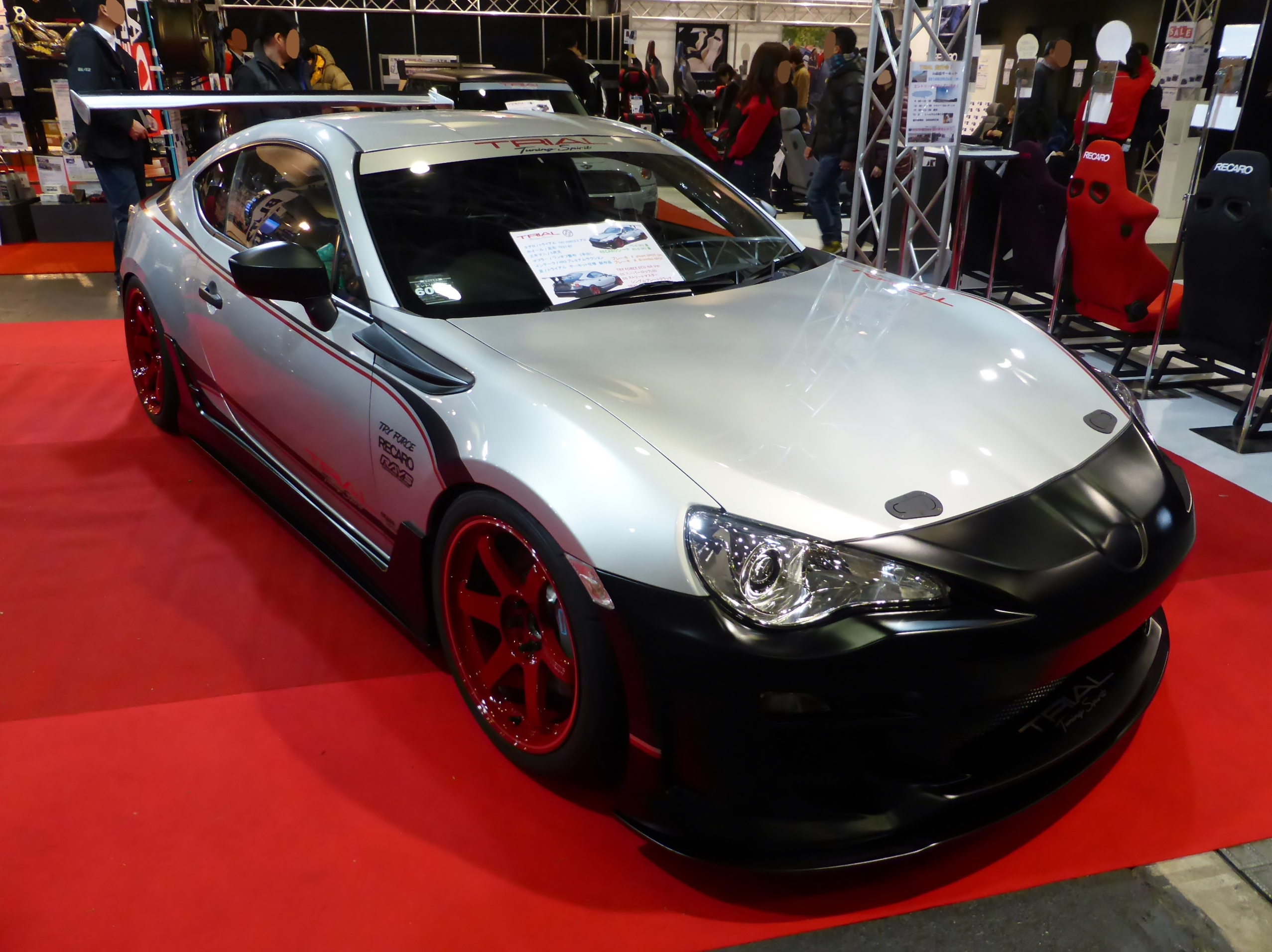 大阪オートメッセ2014においてTRIALブースに展示されているZN6型トヨタ・86を撮影。